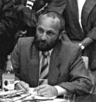 Minister Herbert Schirmer bei einem Podiumsgespräch mit Kunst-und Kulturschaffenden.